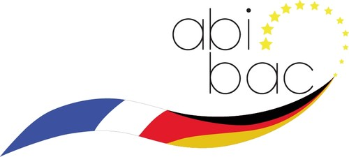 Le logo Abibac a été développé par les élèves du lycée Georges-Clémenceau de Montpellier et du Wentzinger Gymnasium de Freiburg, à l'issue d'un concours organisé lors de l'année franco-allemande en 2013.